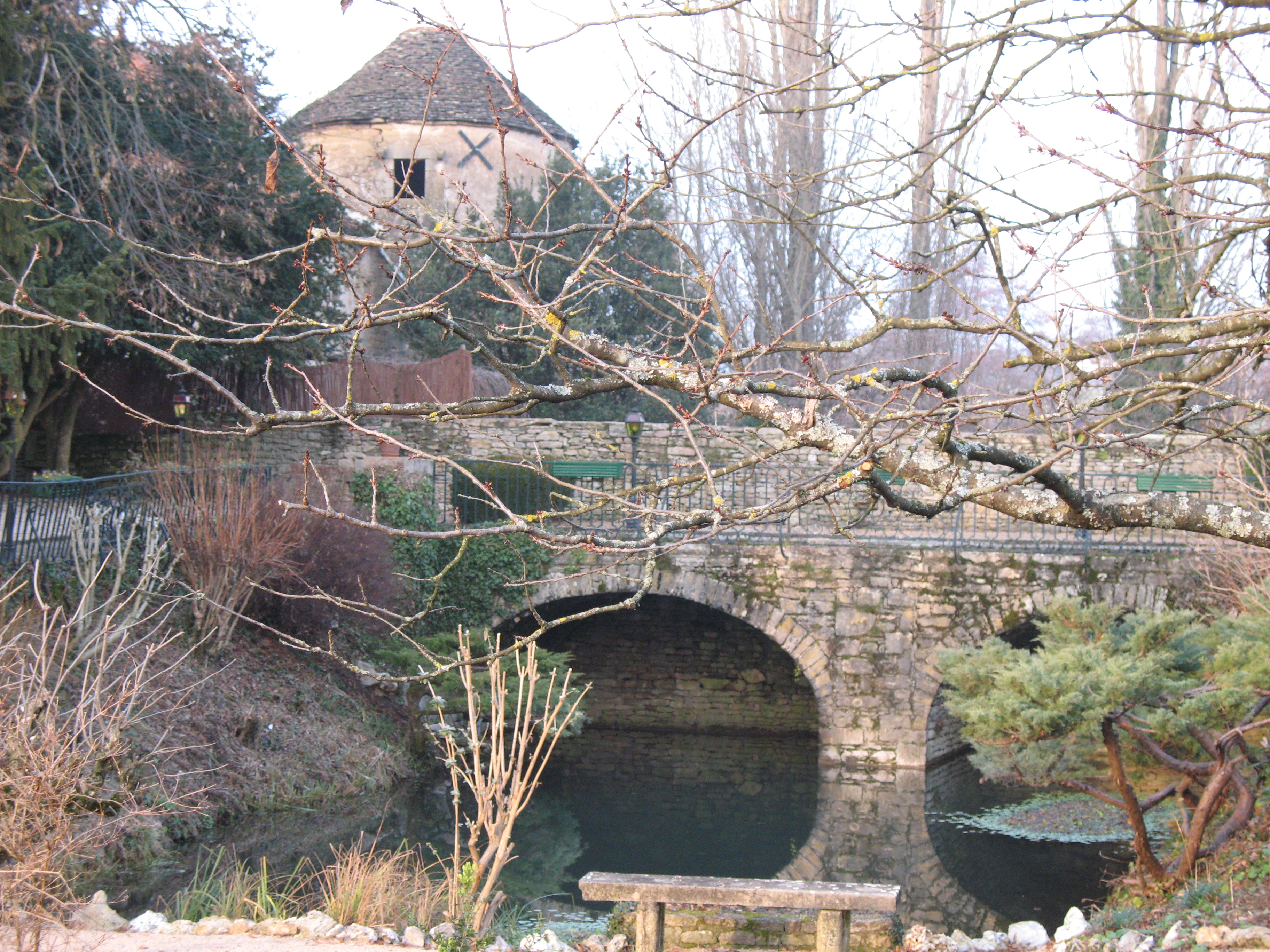 château d'Igé (Saône-et-Loire)